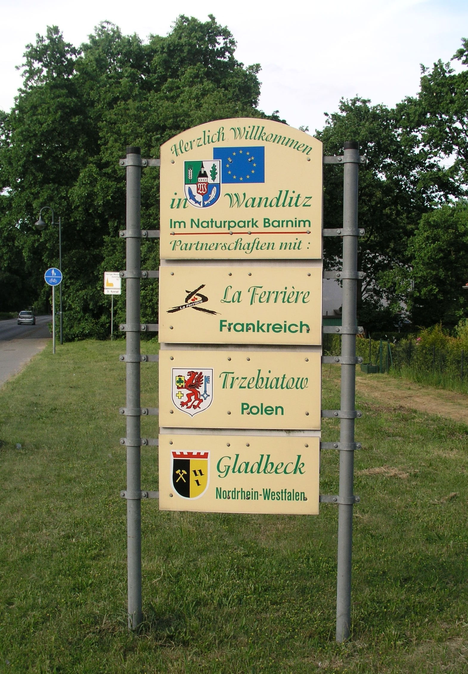 Partnergemeinden von Wandlitz (Ort)